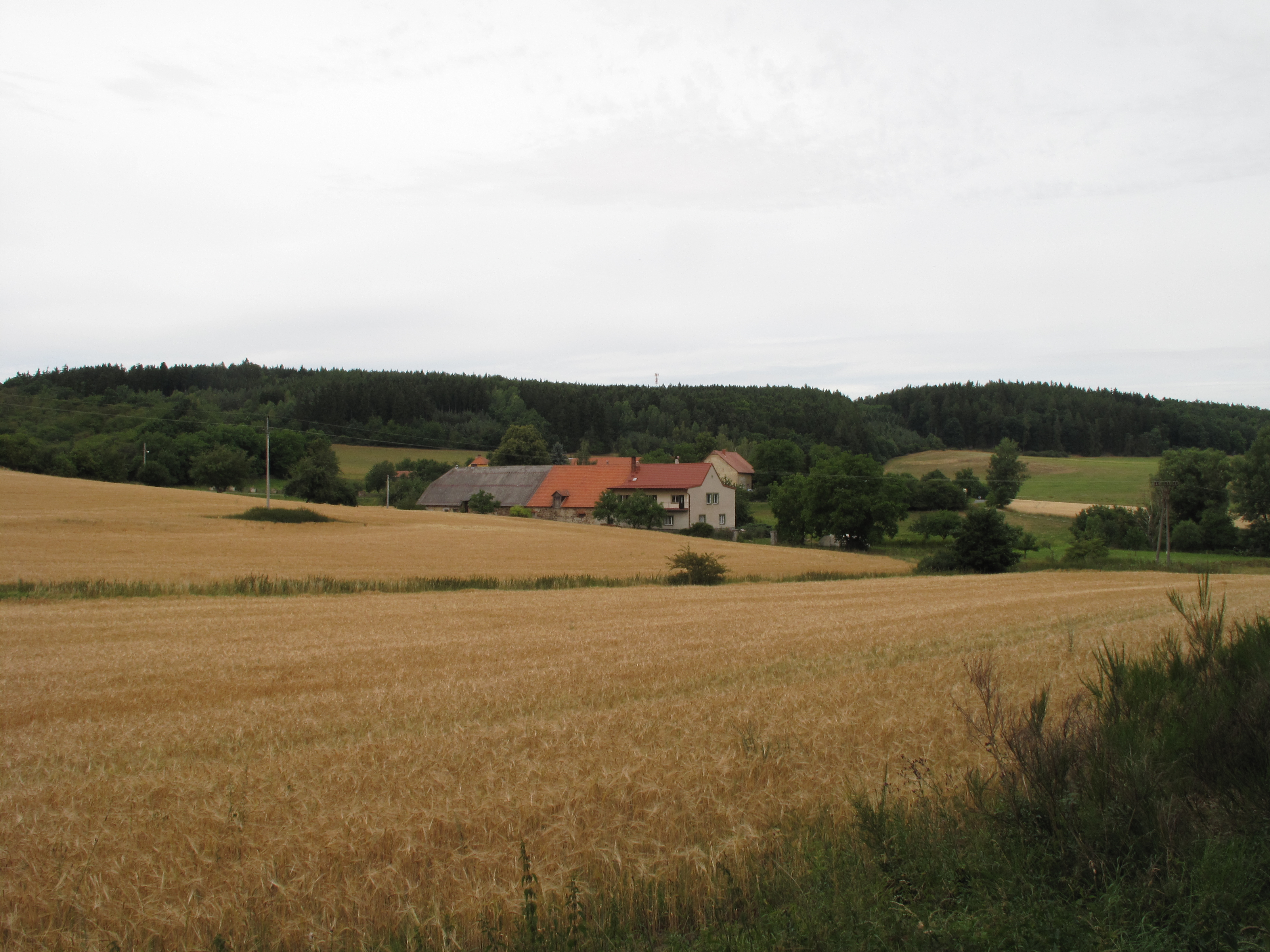 Osojno z dálky. Okres Plzeň-sever, Česká republika.